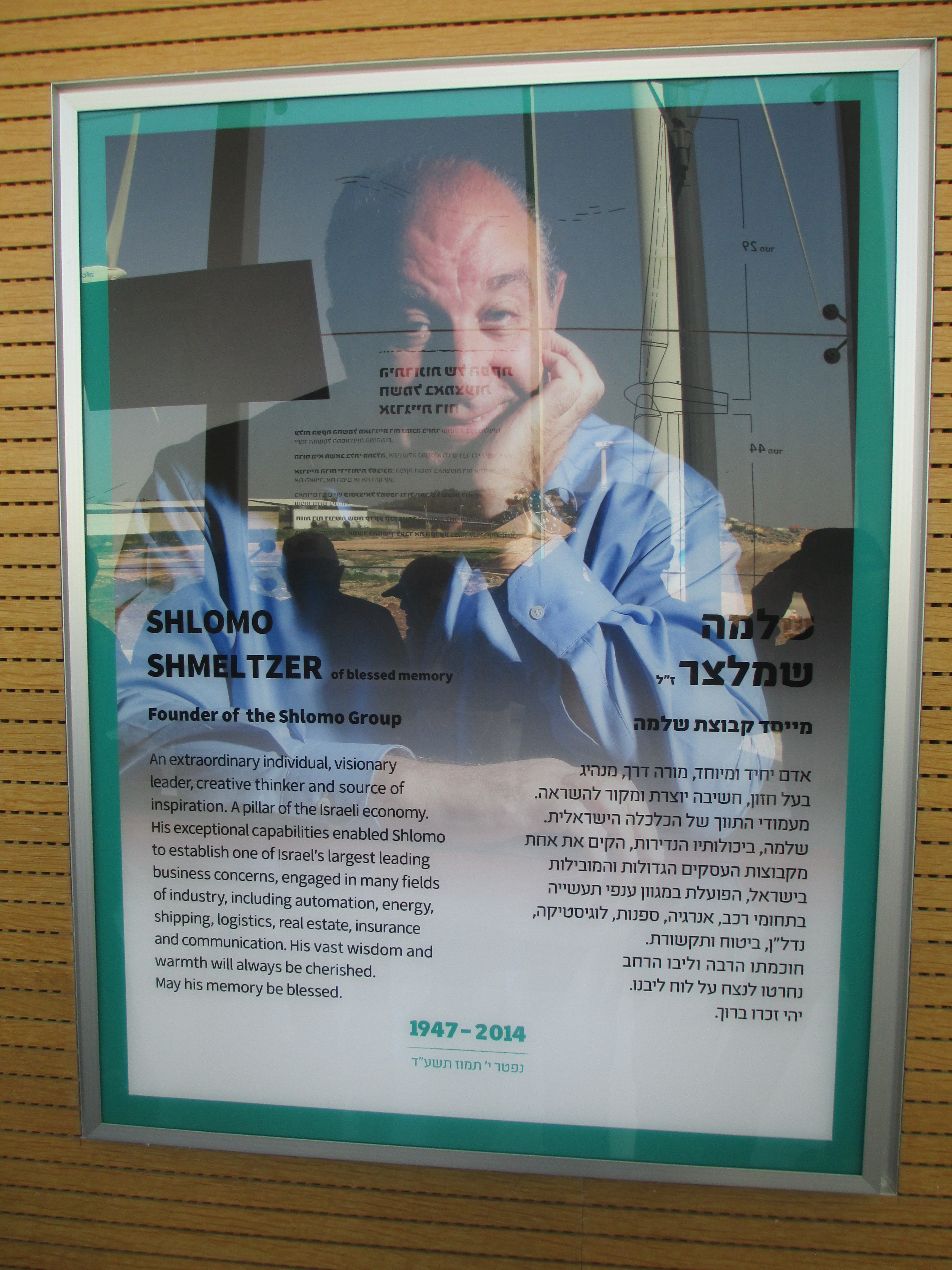 לוחית זיכרון לשלמה שמלצר בחוות הרוח במעלה גלבוע